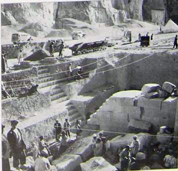 بنای کعبه‌ی زرتشت در هنگام حفاری